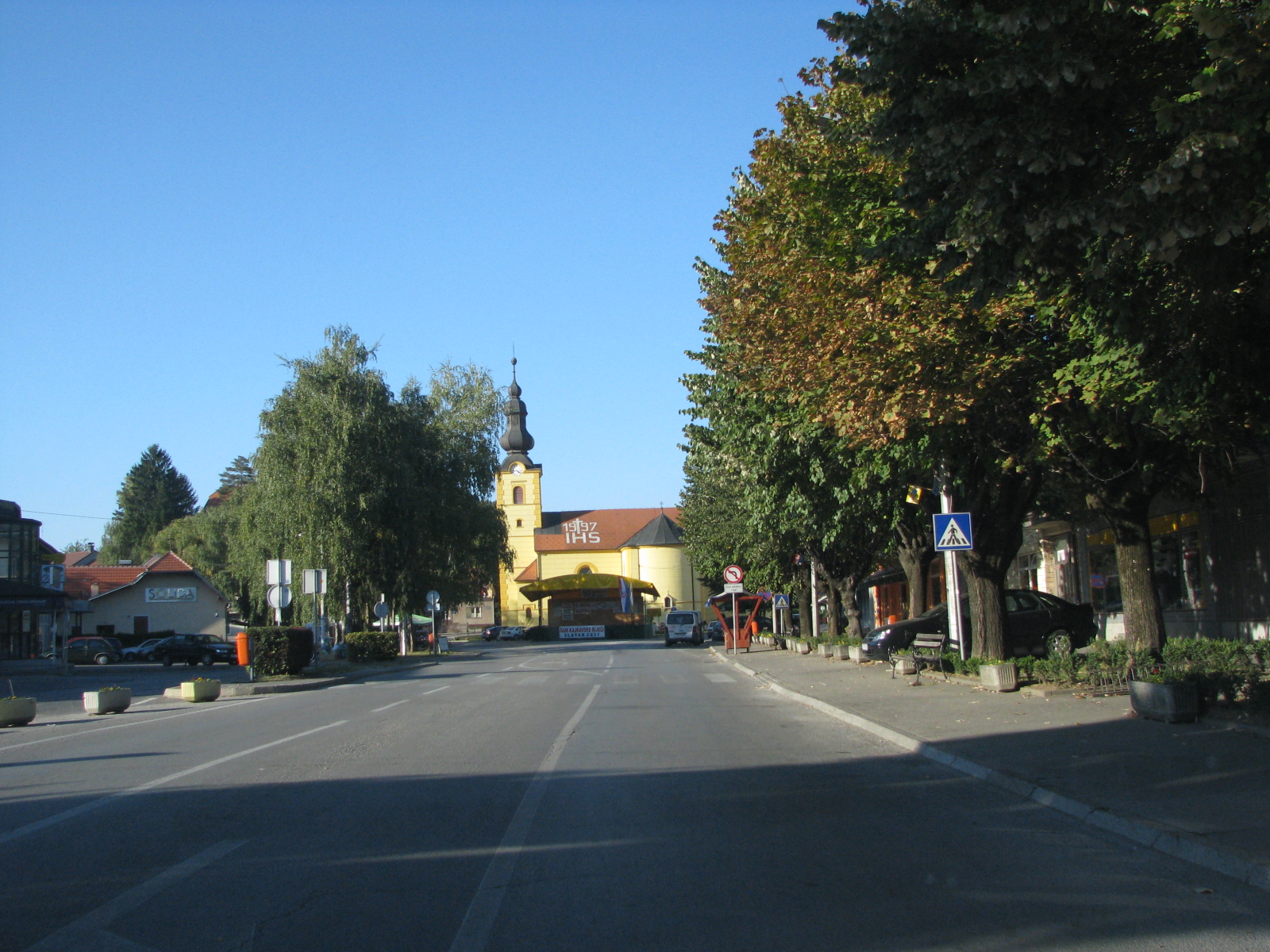 Grad Zlatar